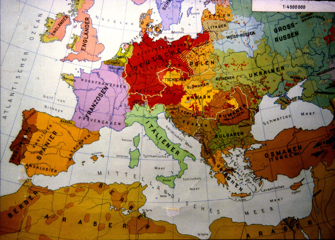 Ethnische Karte Europas